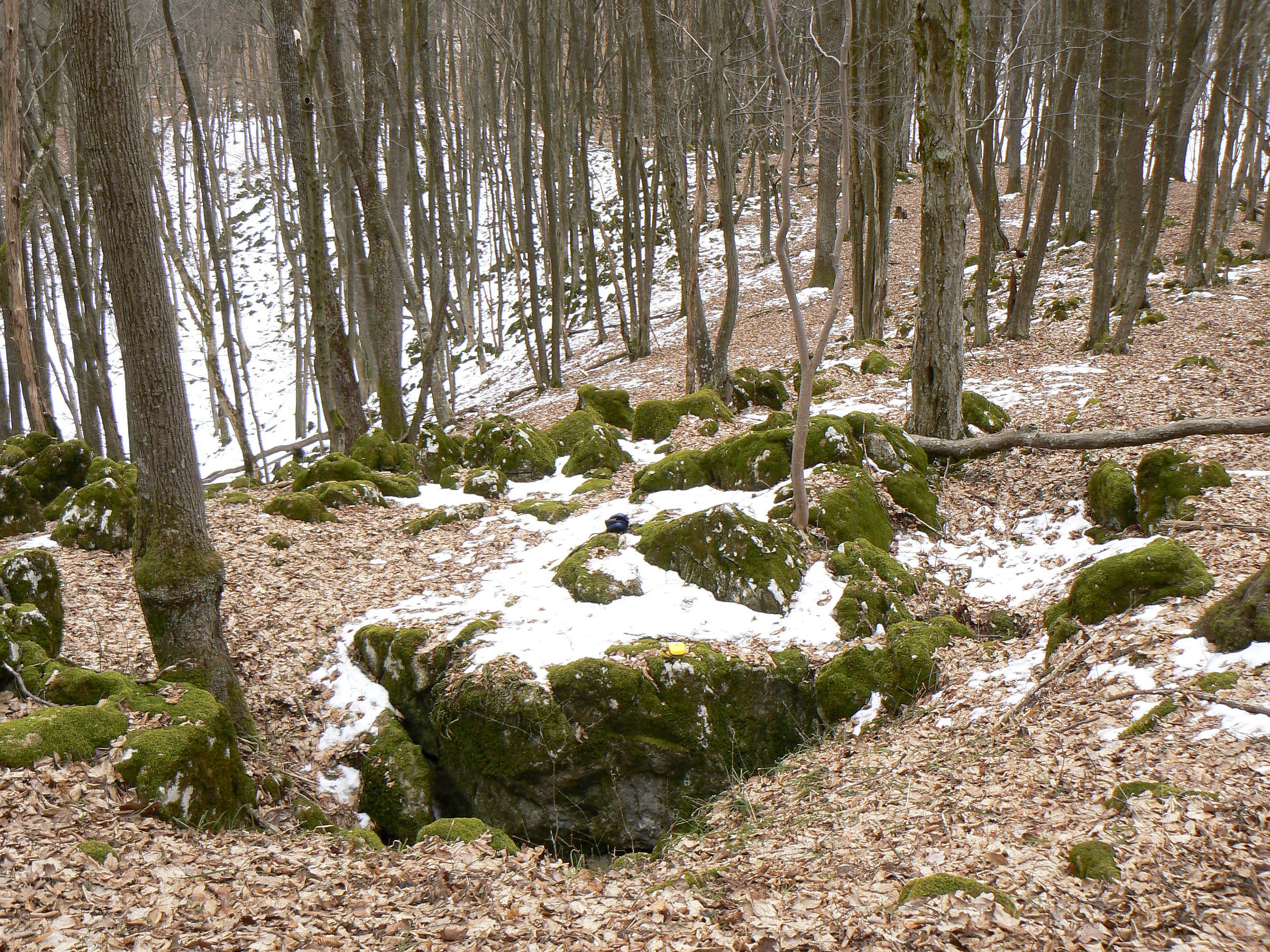 Typickým prvkom reliéfu na Dolnom vrchu sú krasové jamy (závrty). V pozadí je krasová jama V od Kamenistej priepasti (v popredí)